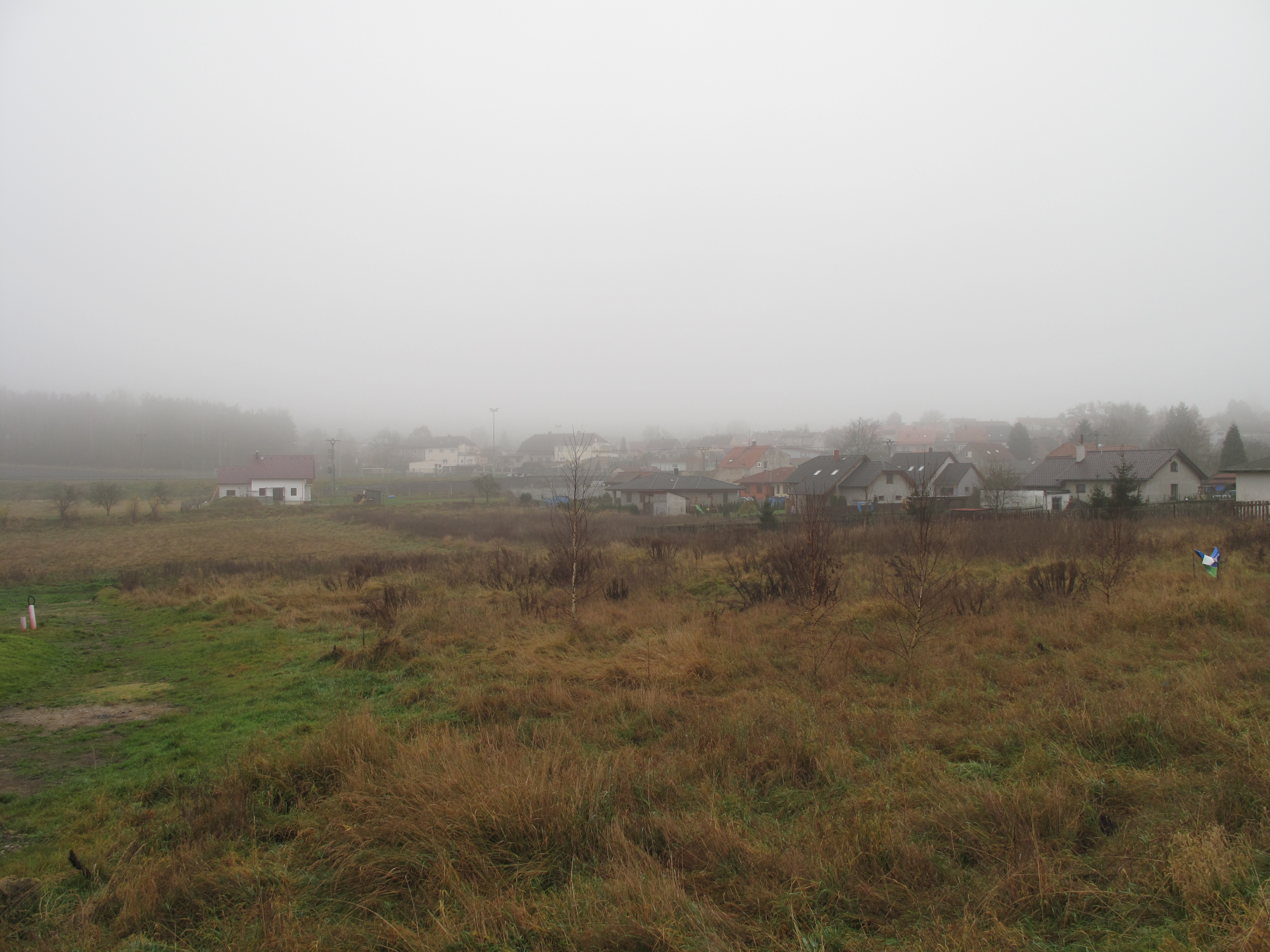 Rodiné domky v Rynholci. Okres Rakovník, Česká republika.